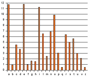 Frequenza delle letteere nell'alfabeto italiano